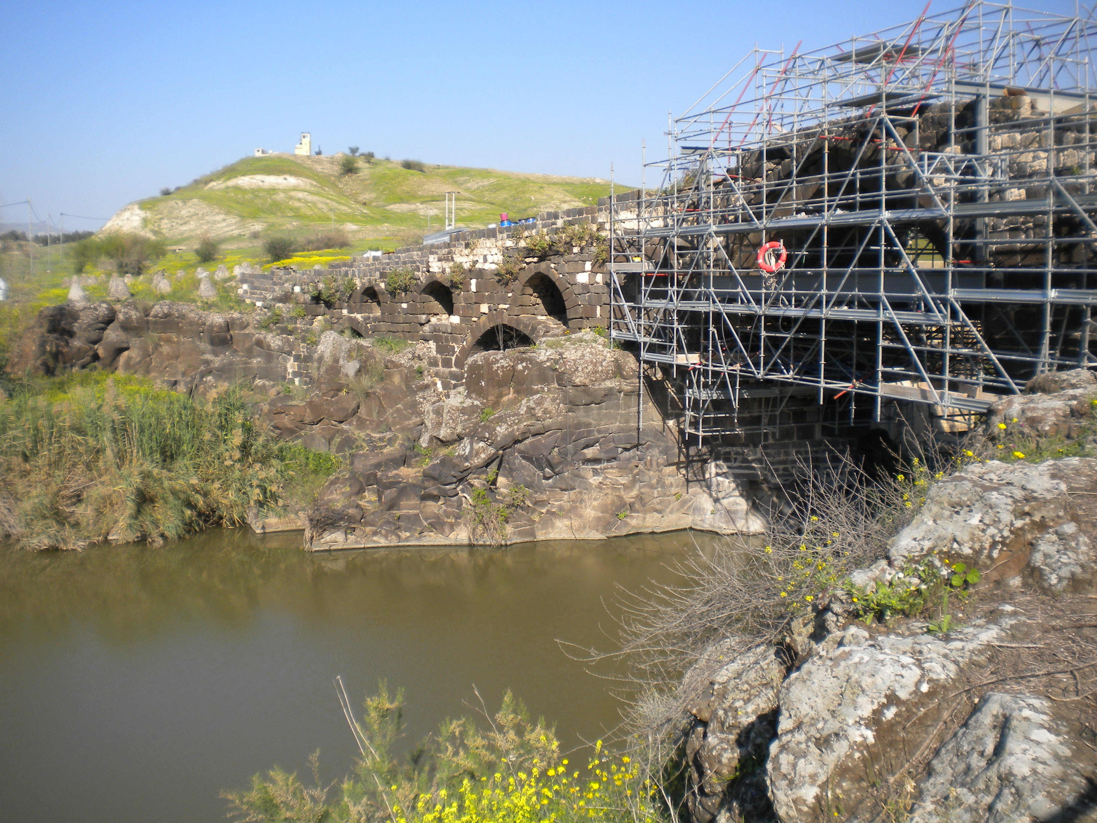 גשר הישנה ונהריים